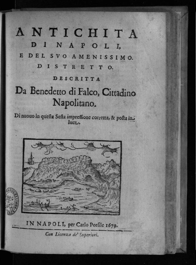 Frontespizio